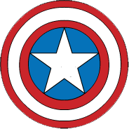 Escudo del Capitán América dibujado en flash